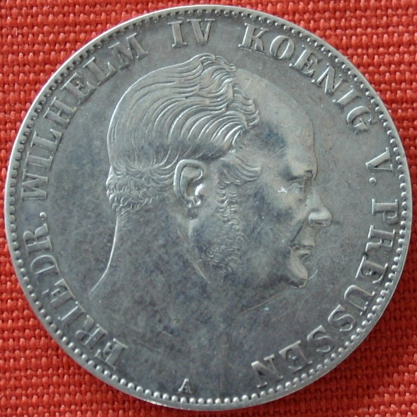 Vereinstaler aus 1860 mit Konterfei Friedrich Wilhelm IV.